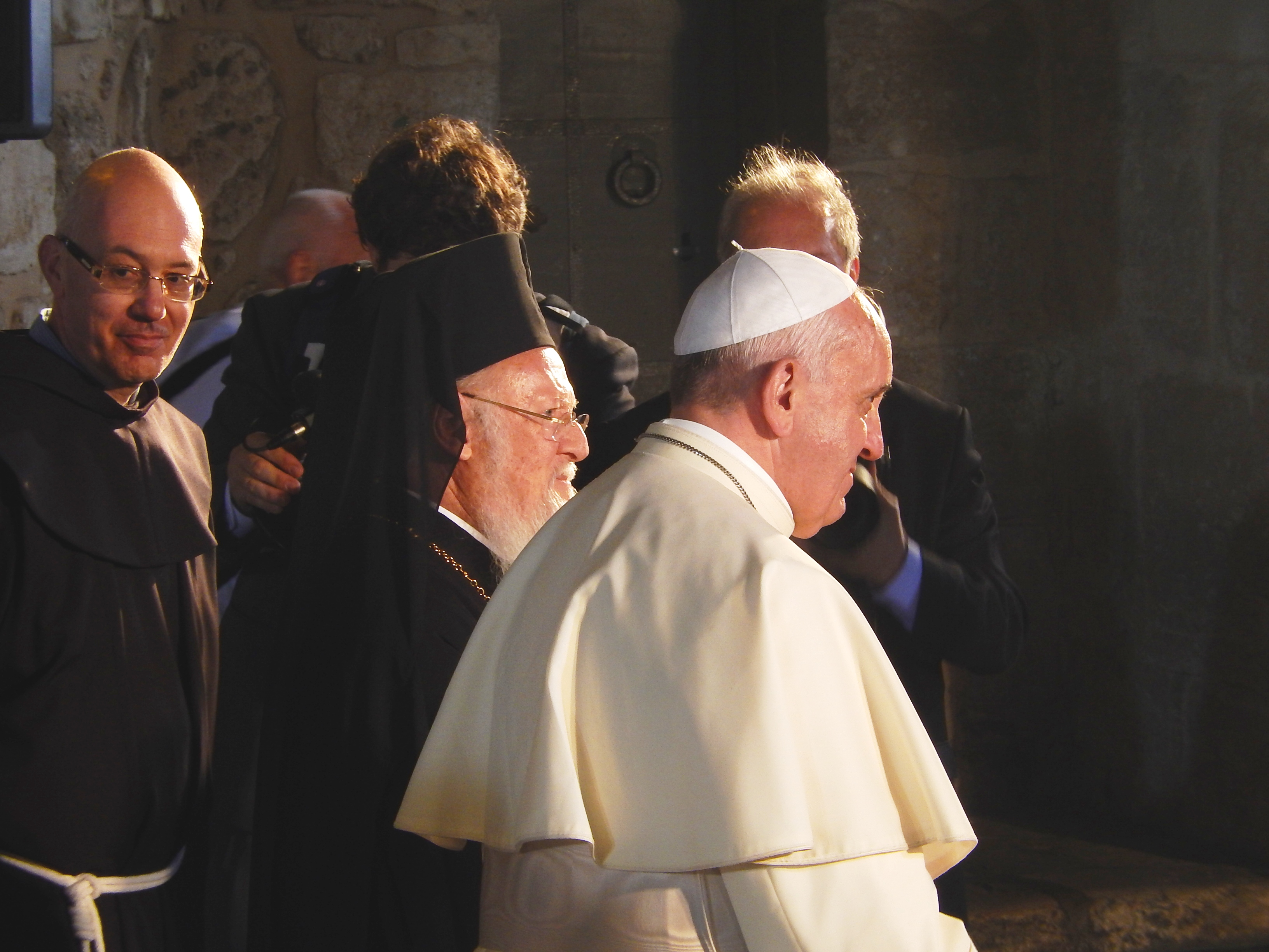 תמונות מהמפגש בין האפיפיור פרציסקוס לבין הפטריארך האקמוני ברתולמאוס בכנסיית הקבר.